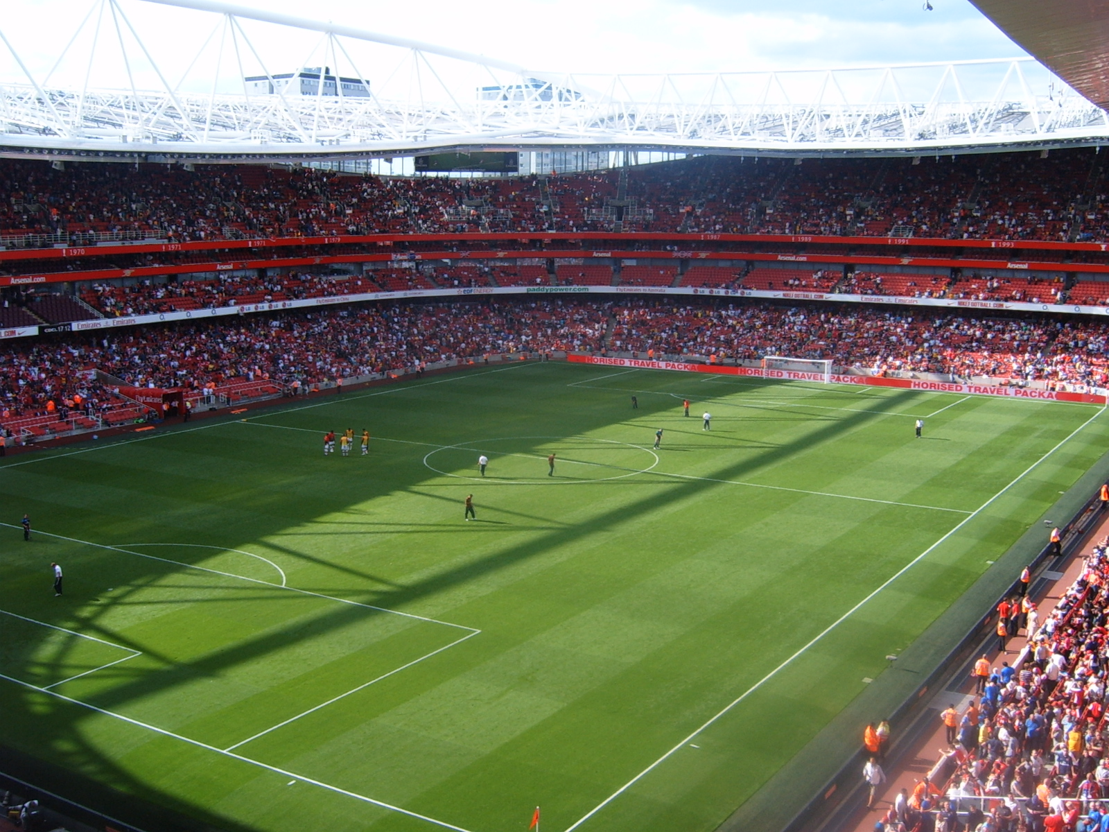 arsenal v rangers 2009